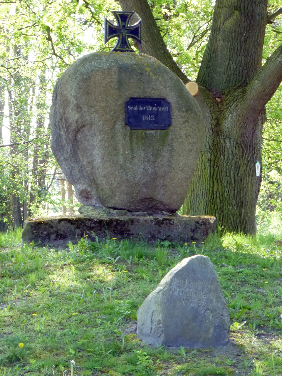 Gedenkstein in Mechau, Ortsteil von Arendsee (Altmark), Deutschland